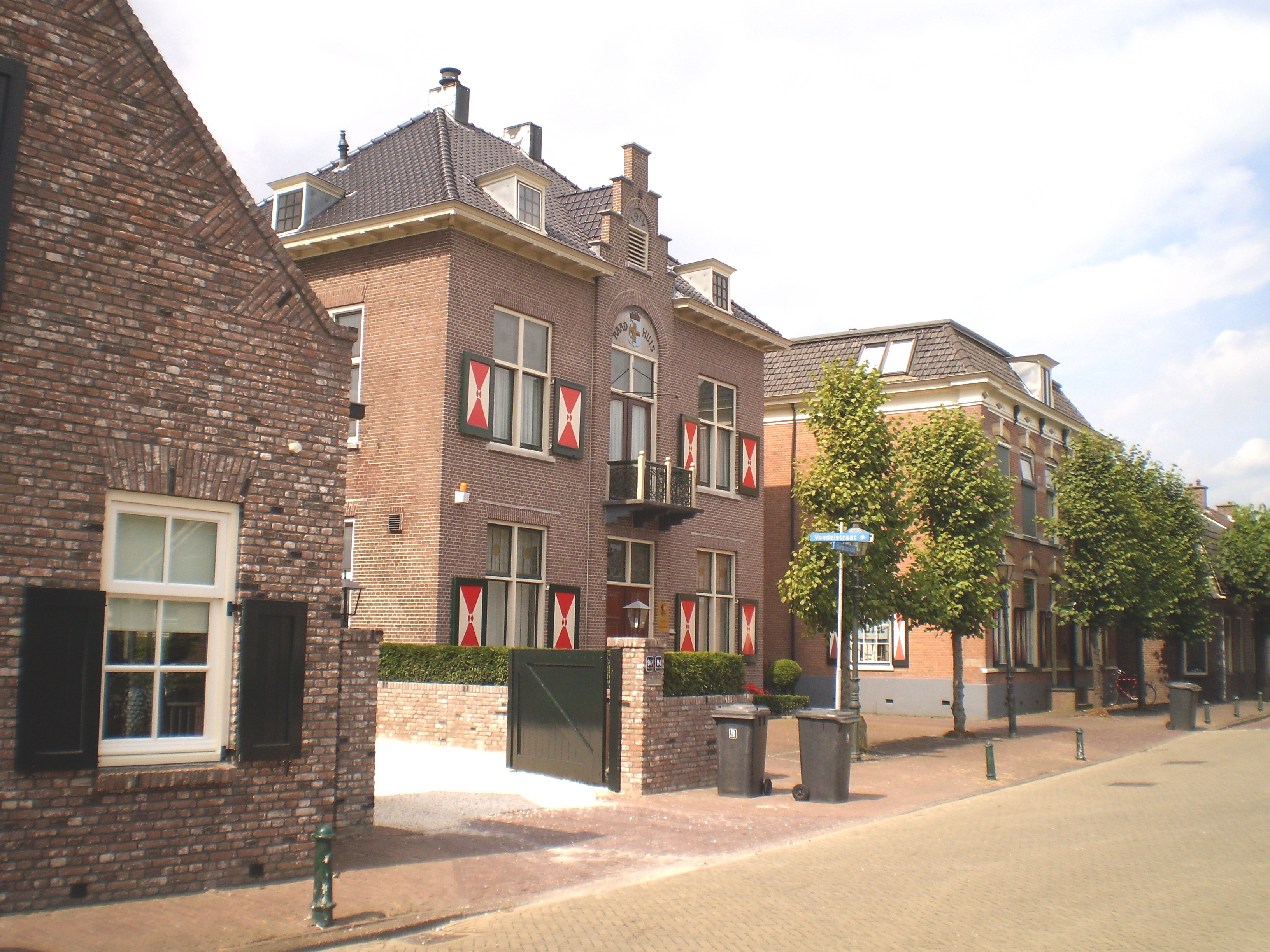 Gemeentehûs Bunschoten